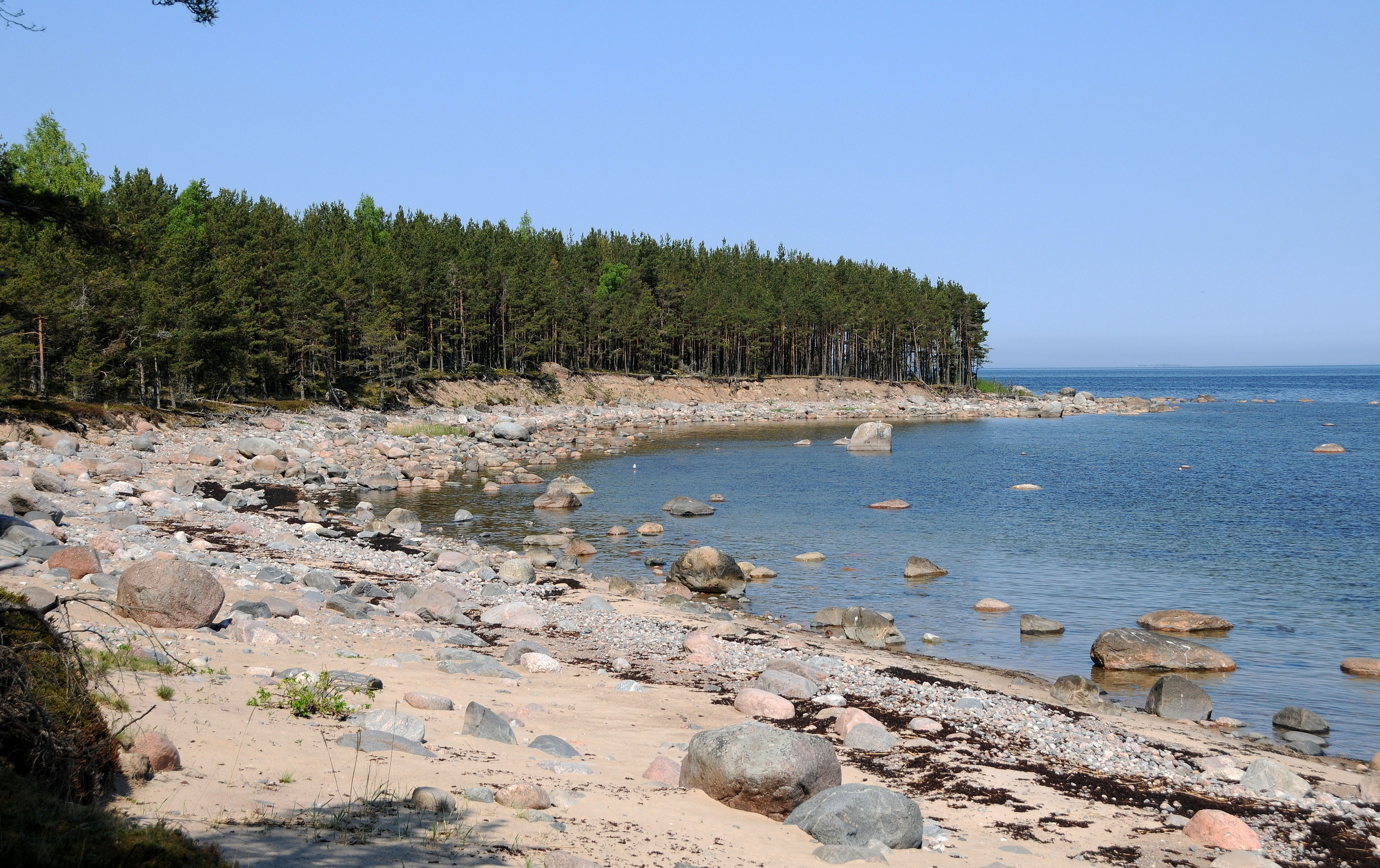 vaade põhjaosa rannikule